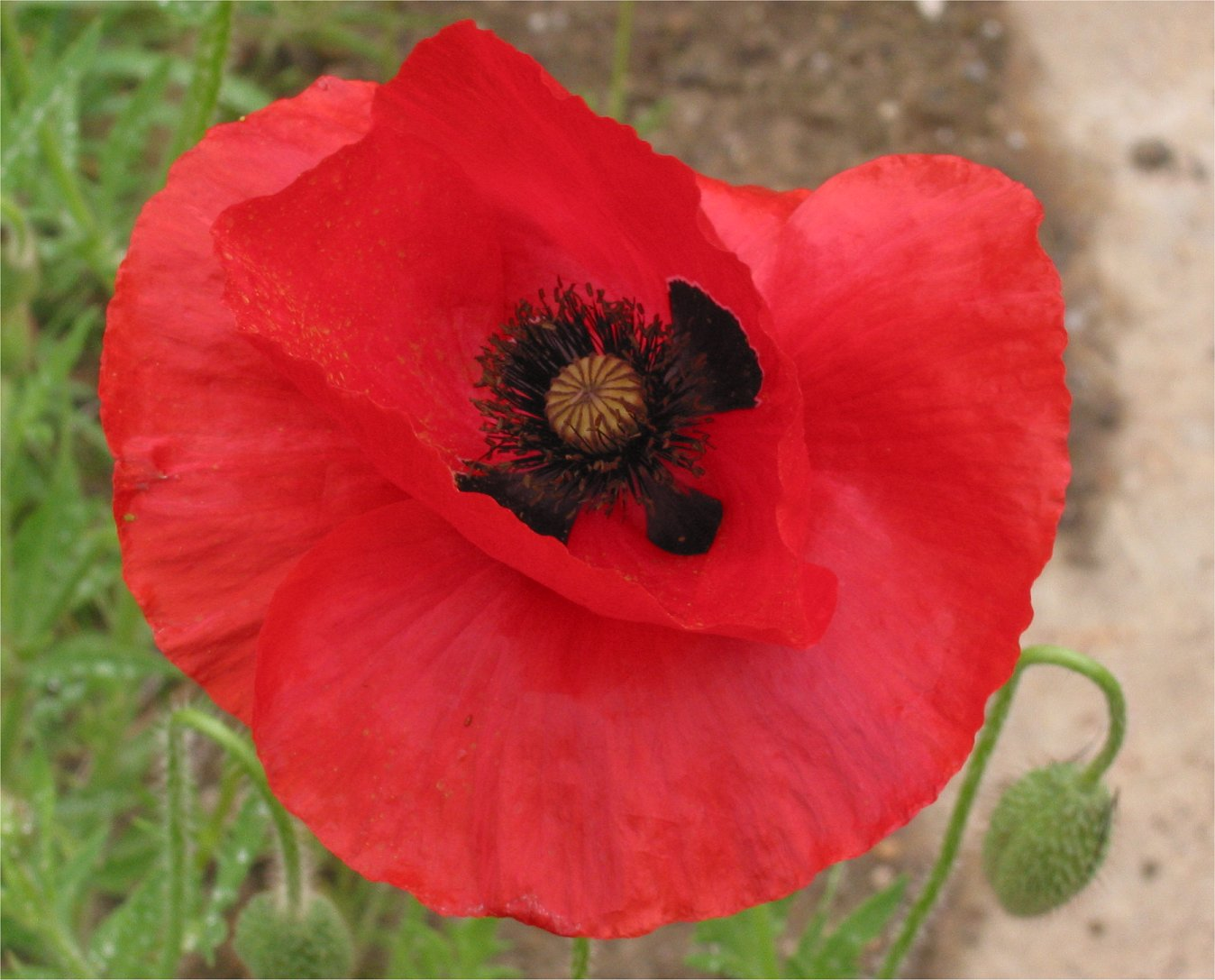 (Grote klaproos met zwarte vlekken) Papaver rhoeas